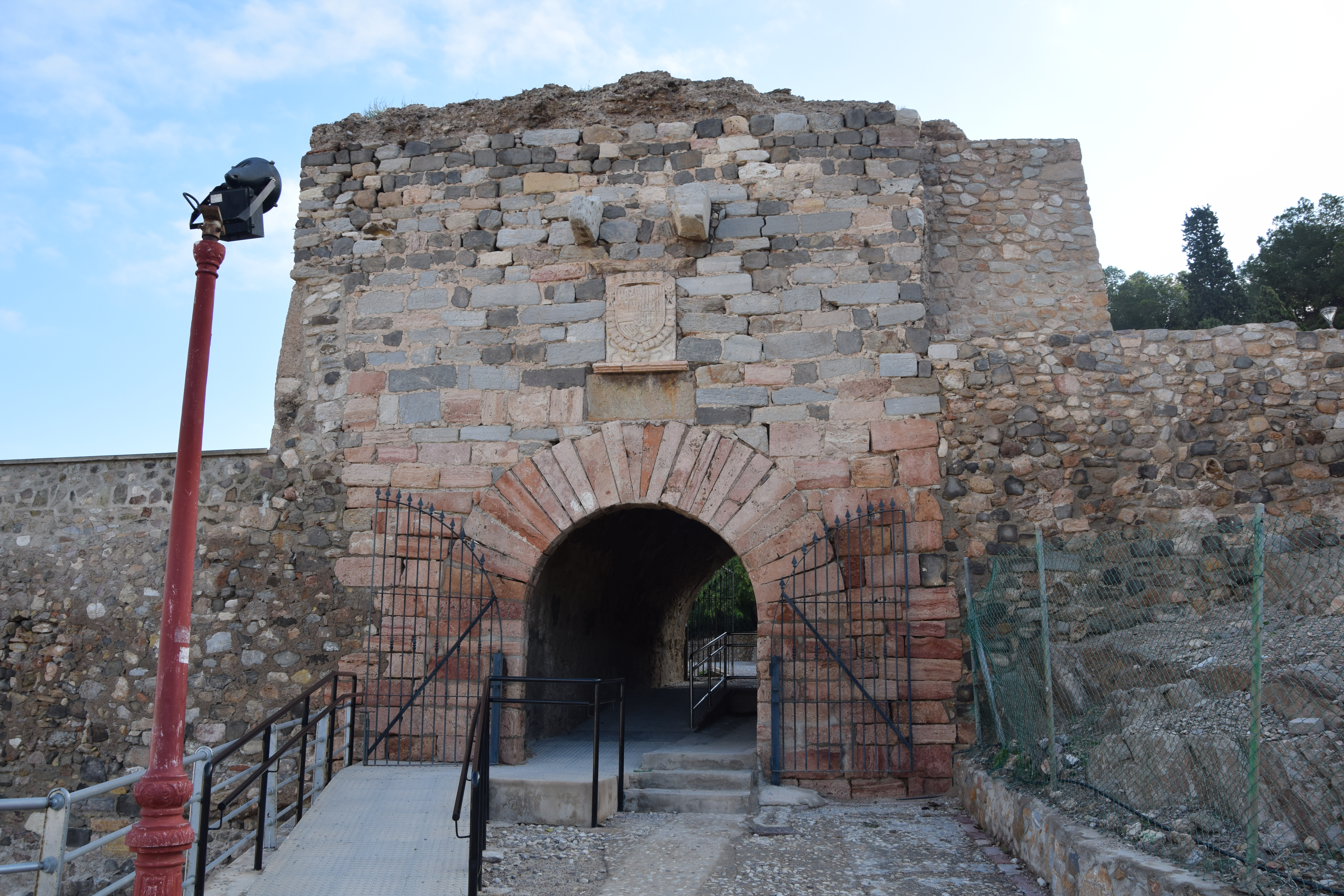 Ruinas y restos Arqueológicos del Cerro de la Concepción Puerta de acceso al castillo de la Concepcion en cartagena conocida popularmente como Puerta de la Villa